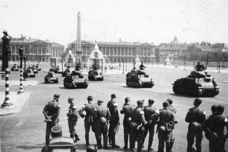 Un grand défilé militaire a eu lieu aux Champs Elysées devant le lieutenant-général Schaumburg Commandant du Grand Paris. N.P.M.: les chars débouchant Place de la Concorde à la fin du défilé.